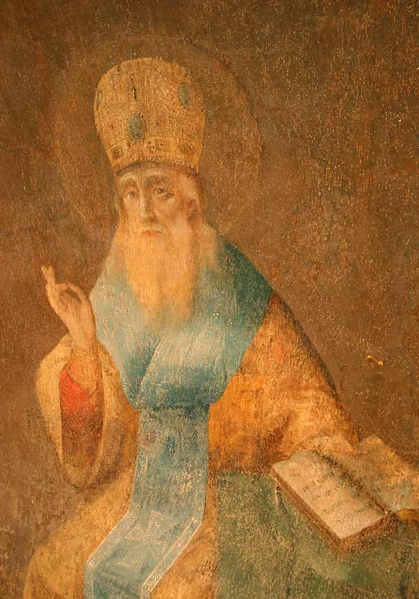 Johannes Paastoaja.